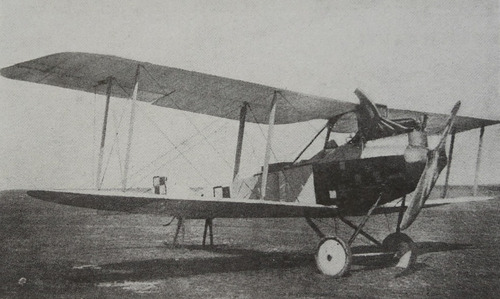 Rumpler C.I - samolot bojowy dumiejscowy produkcji niemieckiej